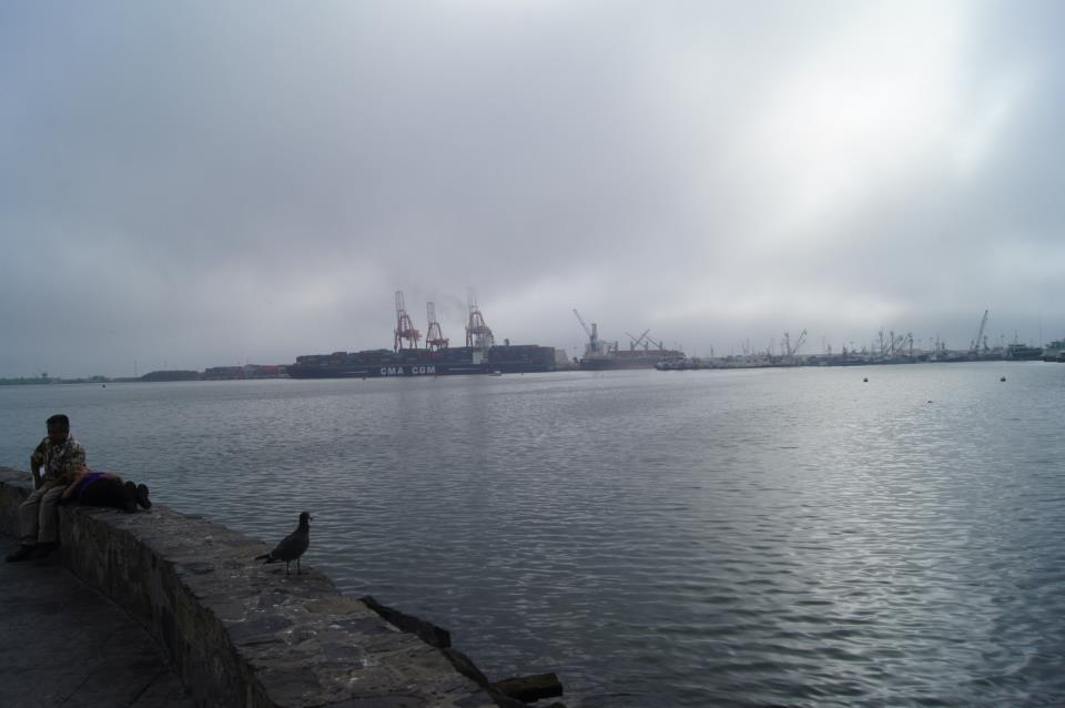 Puerto